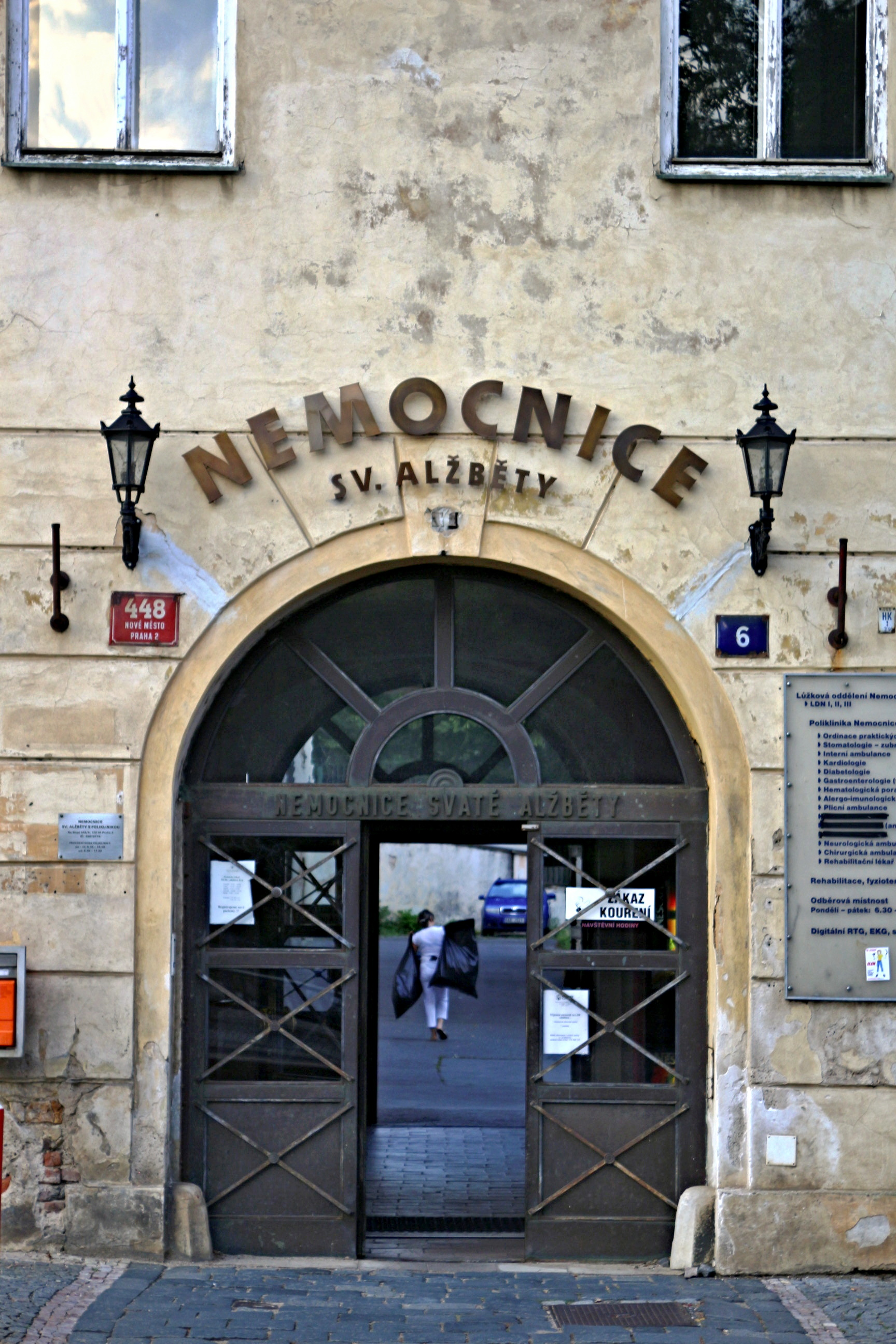 Kostel Panny Marie Sedmibolestné u alžbětinek